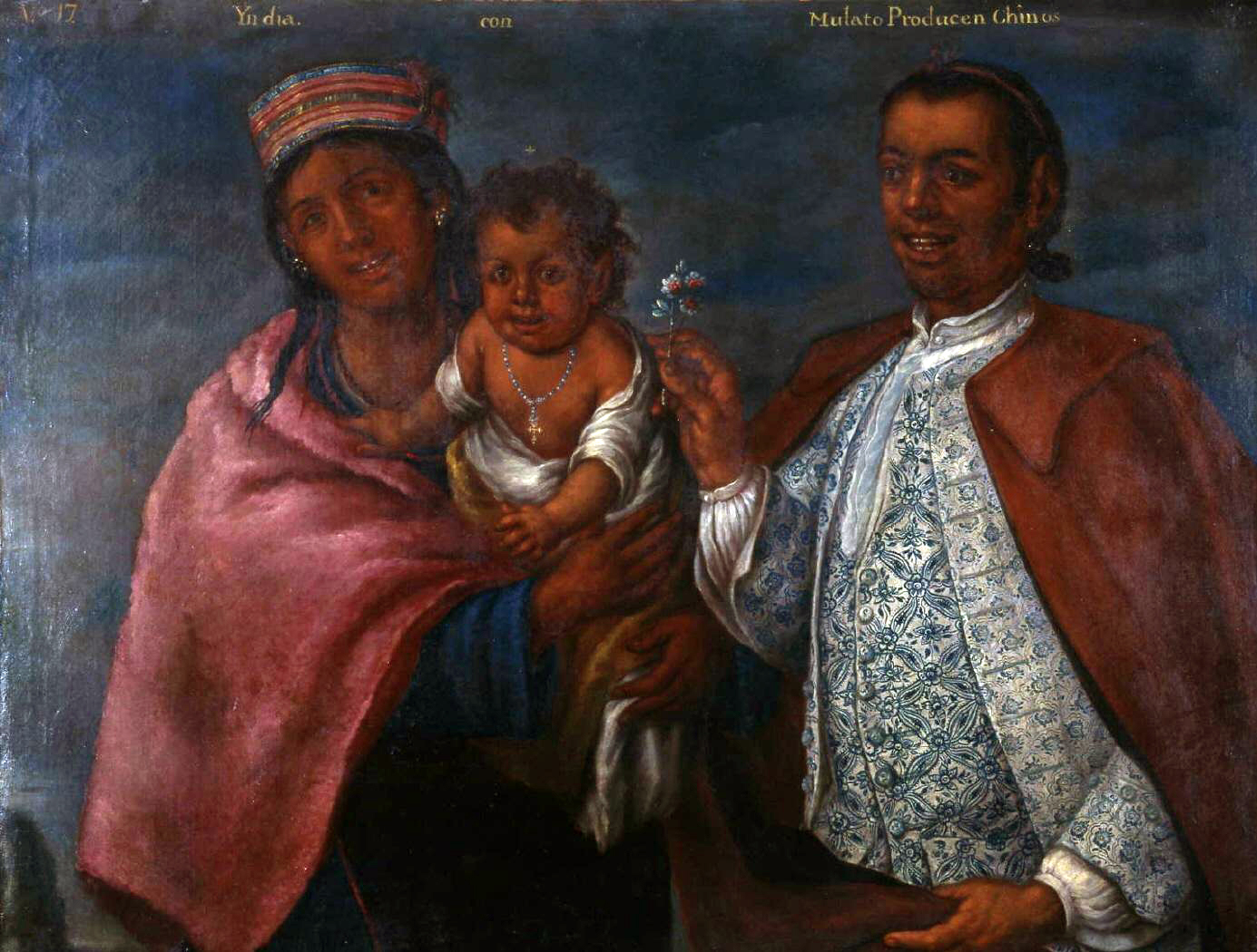 De la serie Los cuadros del mestizaje del Virrey Amat